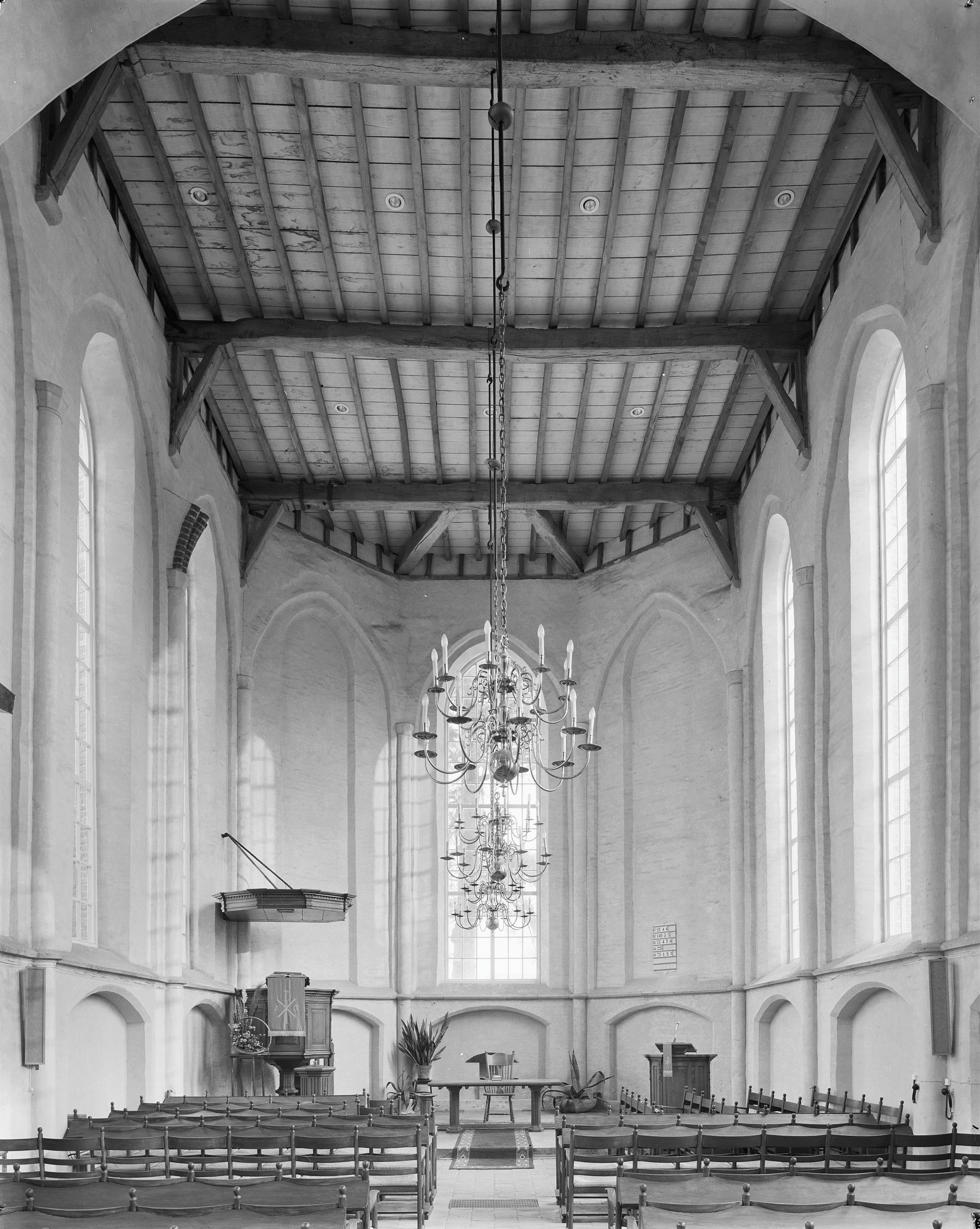 Nederlands Hervormde Kerk: INTERIEUR, OVERZICHT KOOR